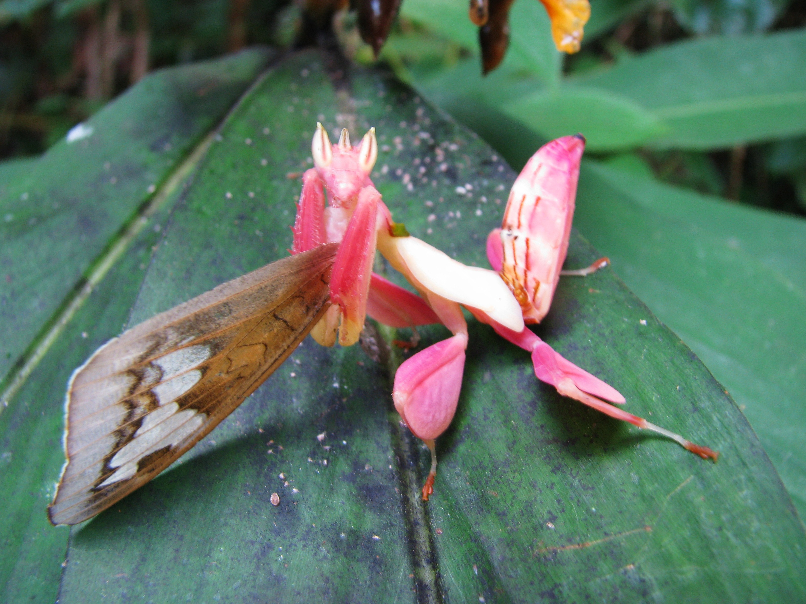 Orchid mantis after lunch